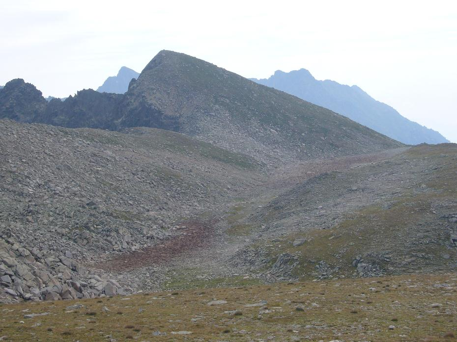 Gran Tuc de Crabes; Espot, Pallars Sobirà, Catalunya